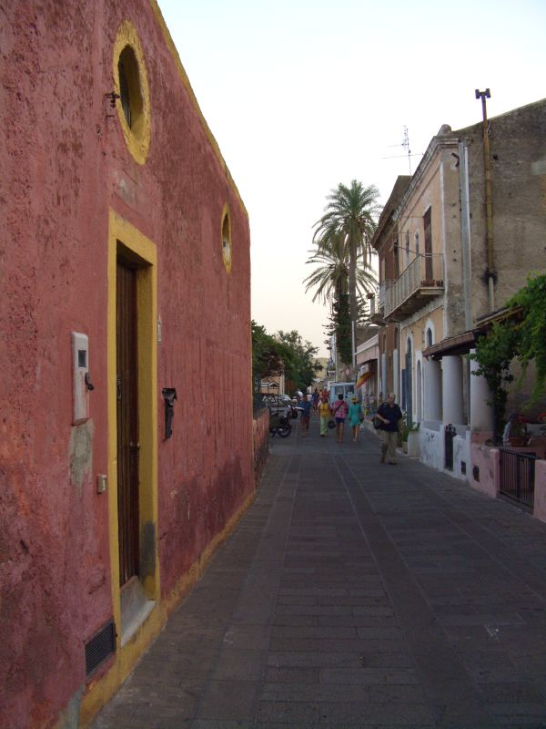 Salina, Sicilia, Italia